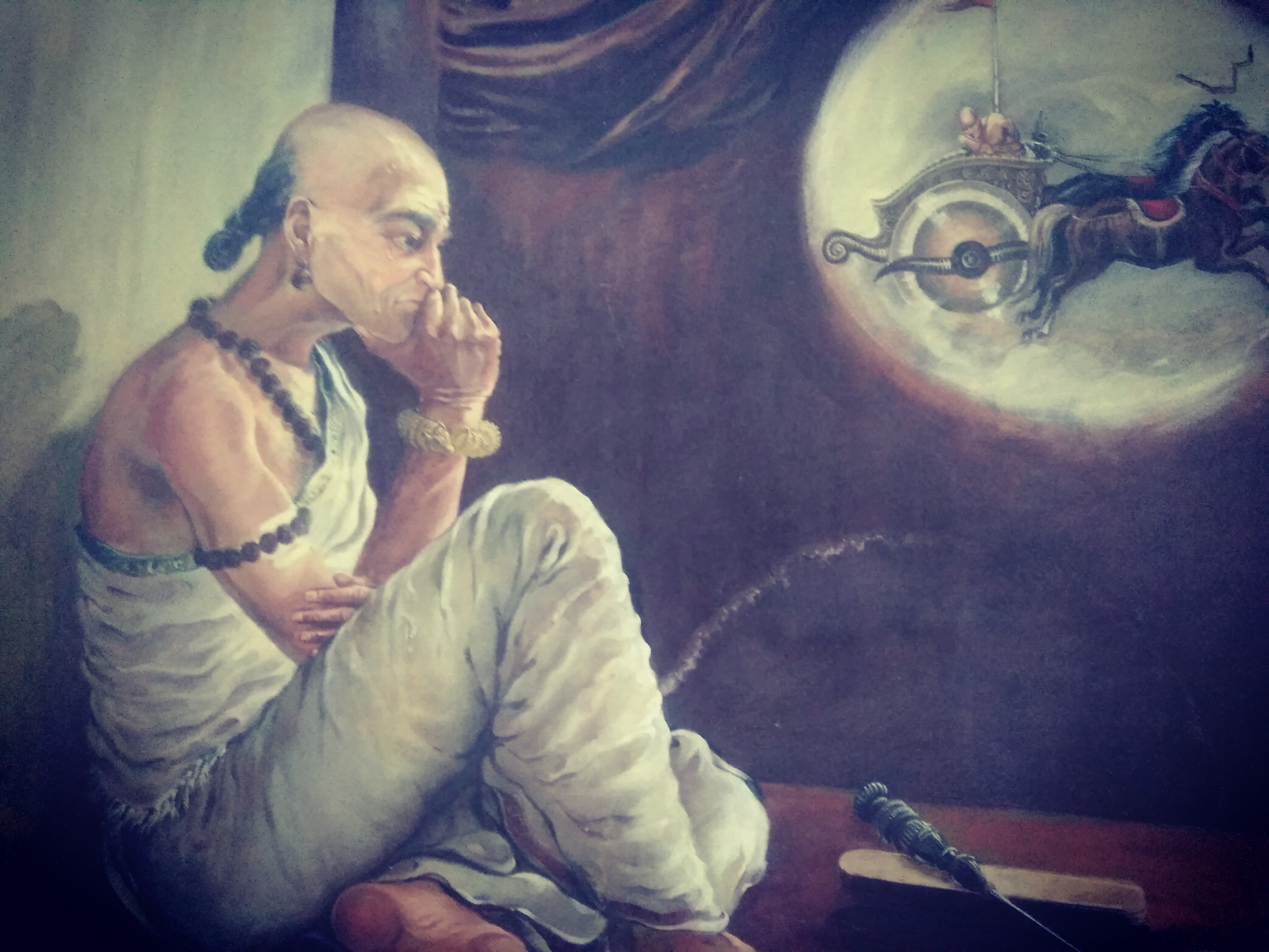 ఎర్రాప్రగడ: భారతాన్ని తెనిగించిన కవిత్రయంలో చివరివాడు.నన్నయ, తిక్కనలు అరణ్య పర్వాన్ని వదిలివేశారు.ఆ పర్వ భారాన్ని ఎర్రాప్రగడ మెూశాడు.పూర్వ పర్వాలను అనుసంధించే అరణ్య పర్వాన్ని పూరించాడు. Errapragada: The least of the Telugu poet trinity who took up the work of translating Aranya Parva left over the Nannaya and Tikkana .He very ably executed the work considering the restrospective and conspective aspects of Aranya Parva. Artist:P.S Chandrasekhar